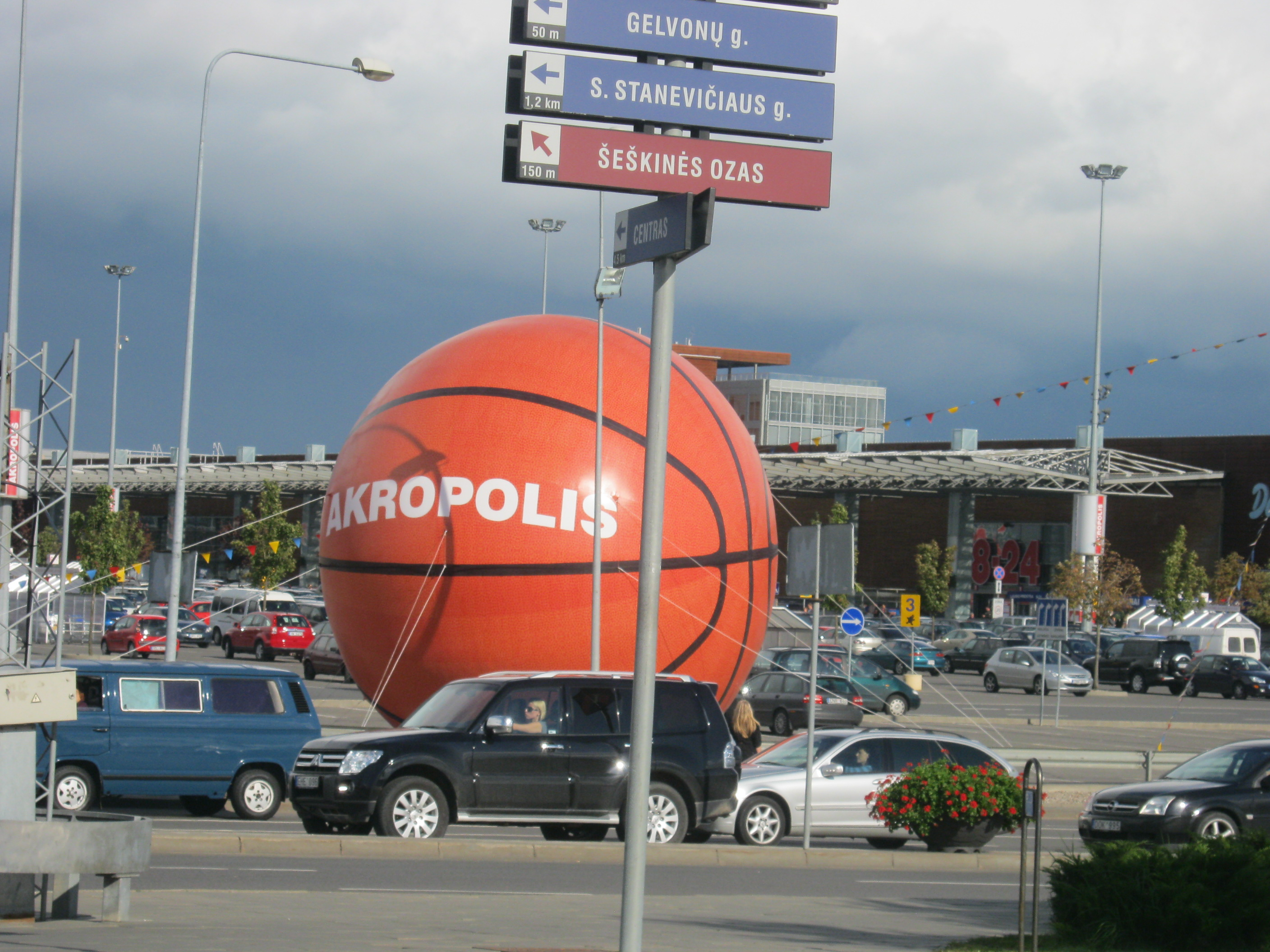 Akropolis